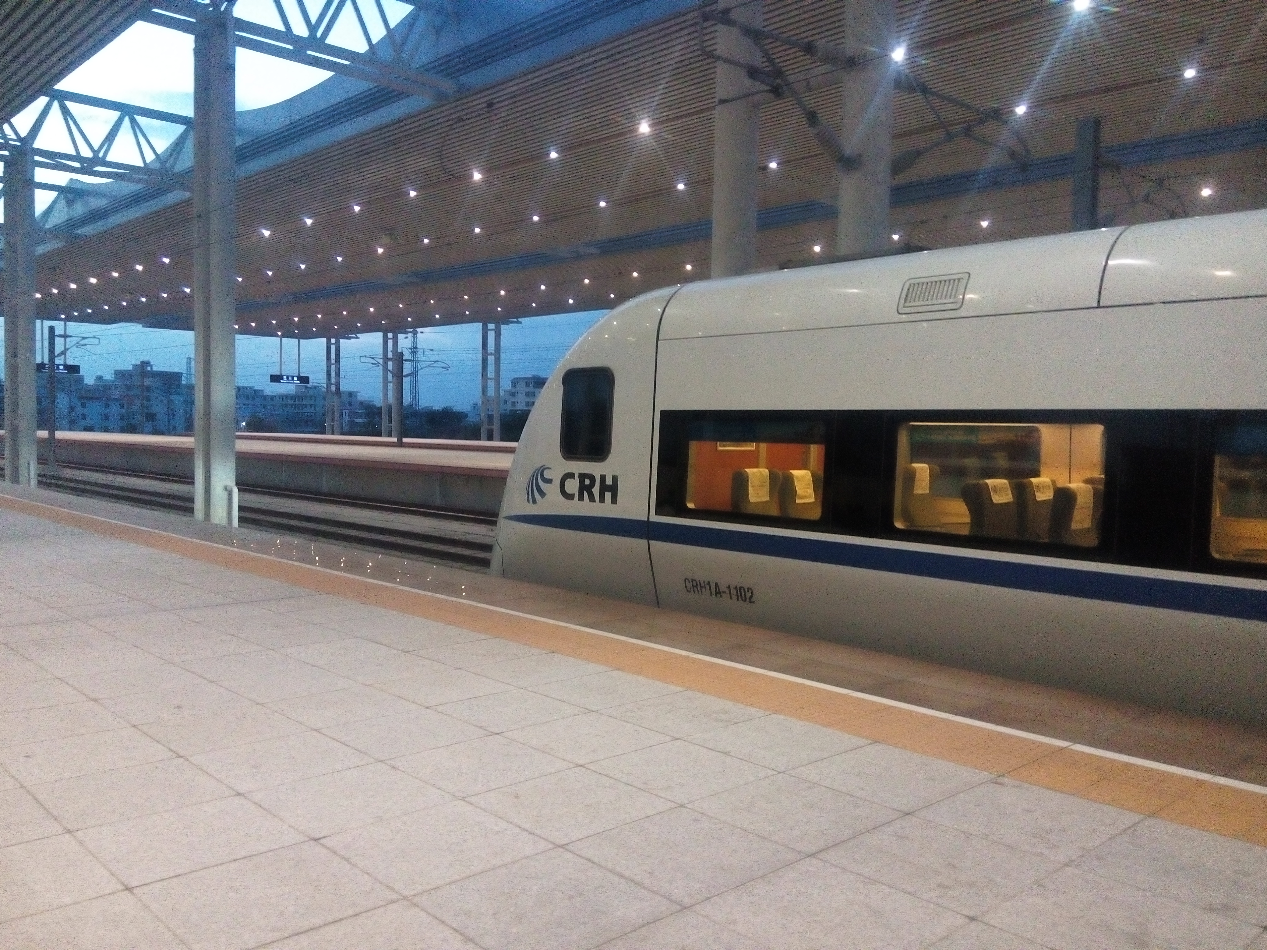 三亚站 3站台停靠这D7341，车底是CRH1A-1102